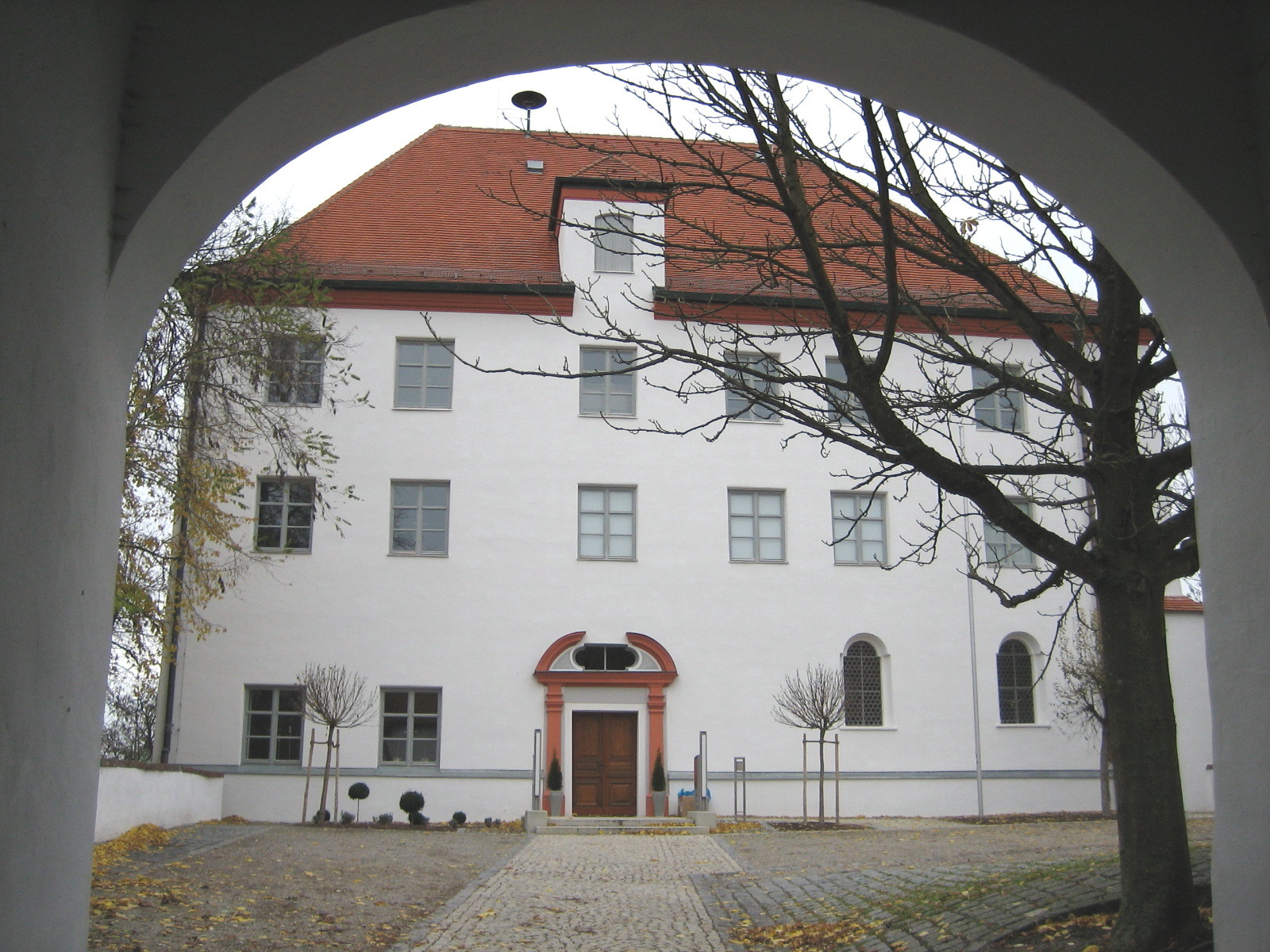 Burgau in Schwaben, Blick durch den Schlosshof auf das Schloss, in dem sich am Aufnahmetag das Heimatmuseum befindet